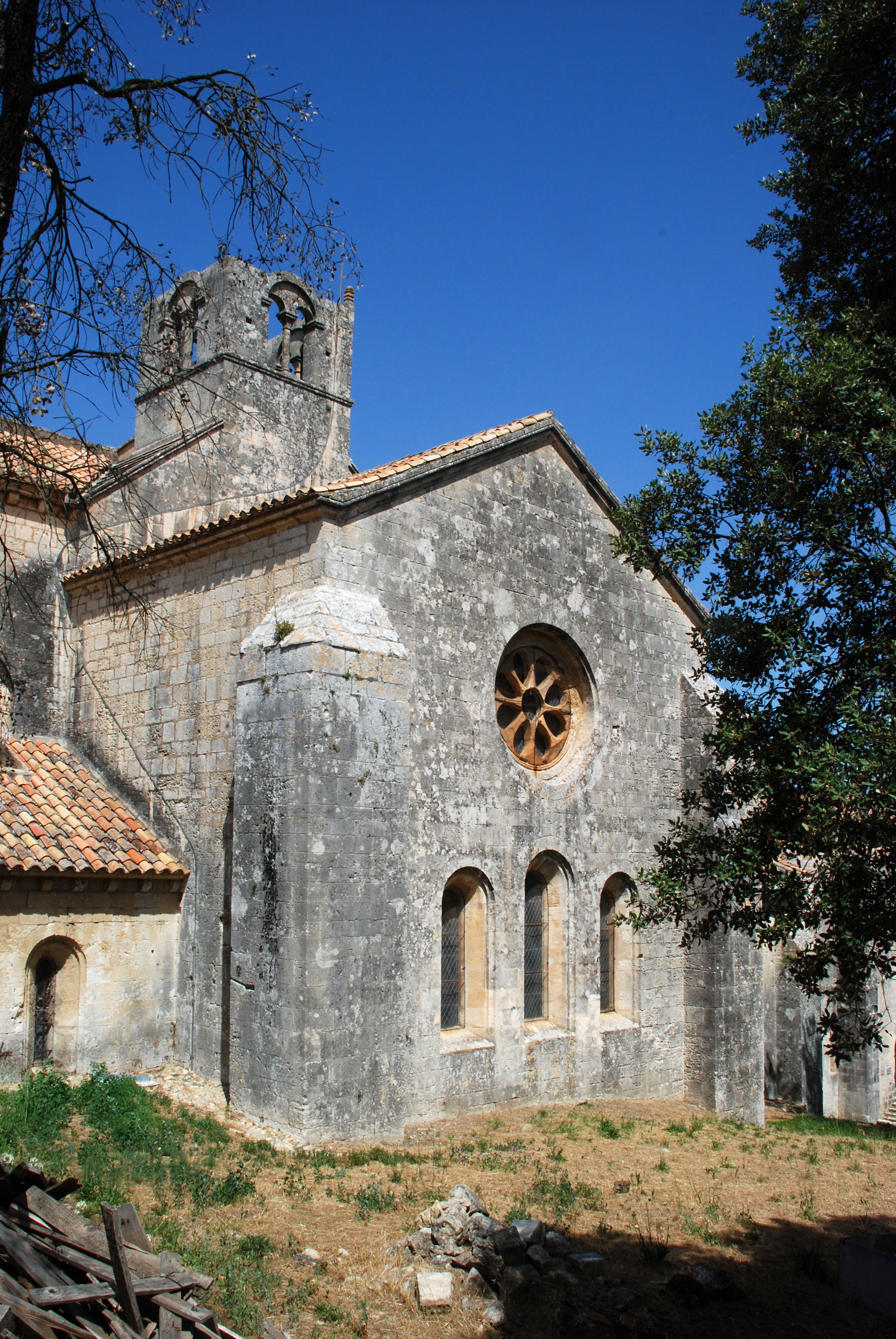 France - Provence - Abbaye de Silvacane